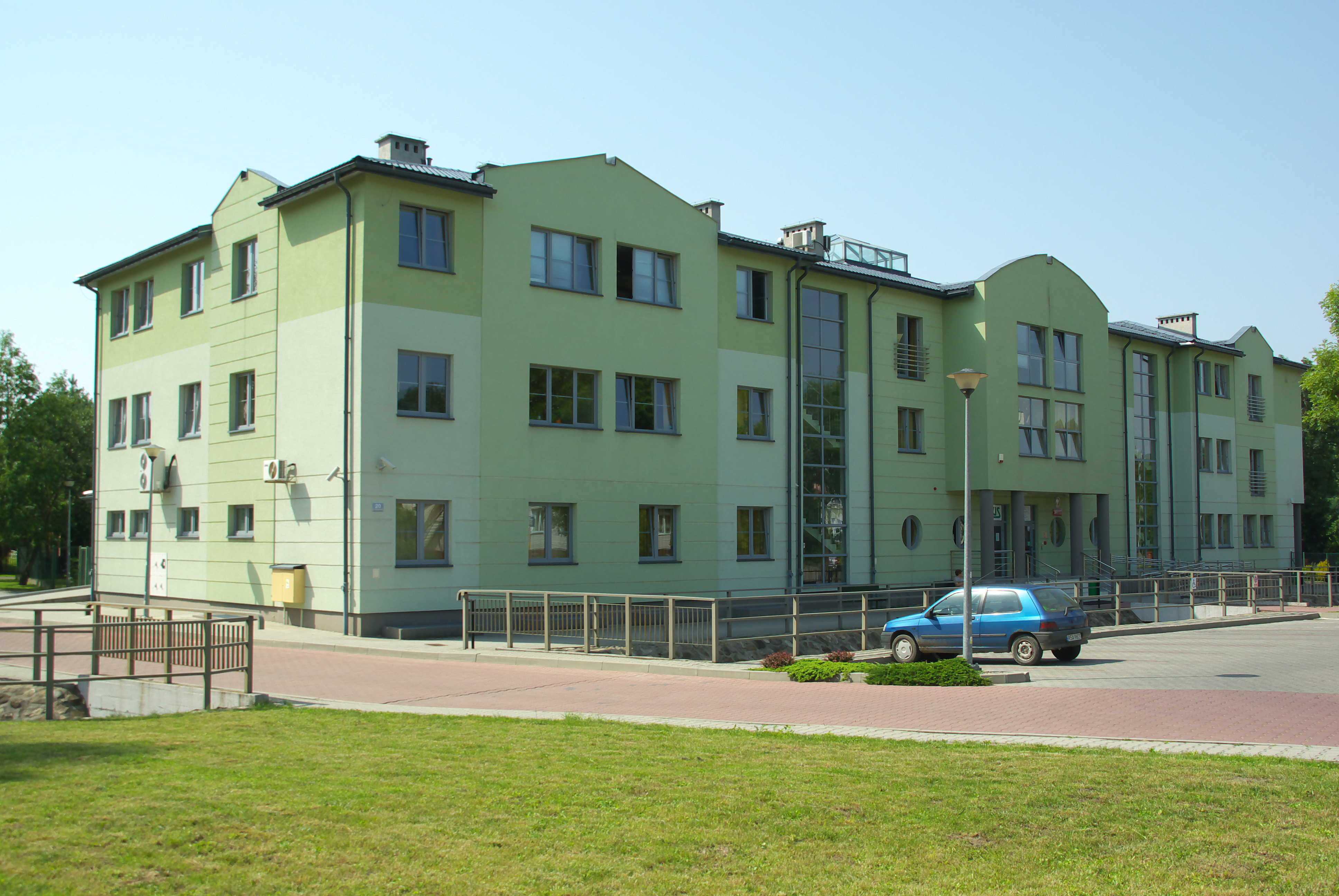 ZUS Sanok Konarskiego